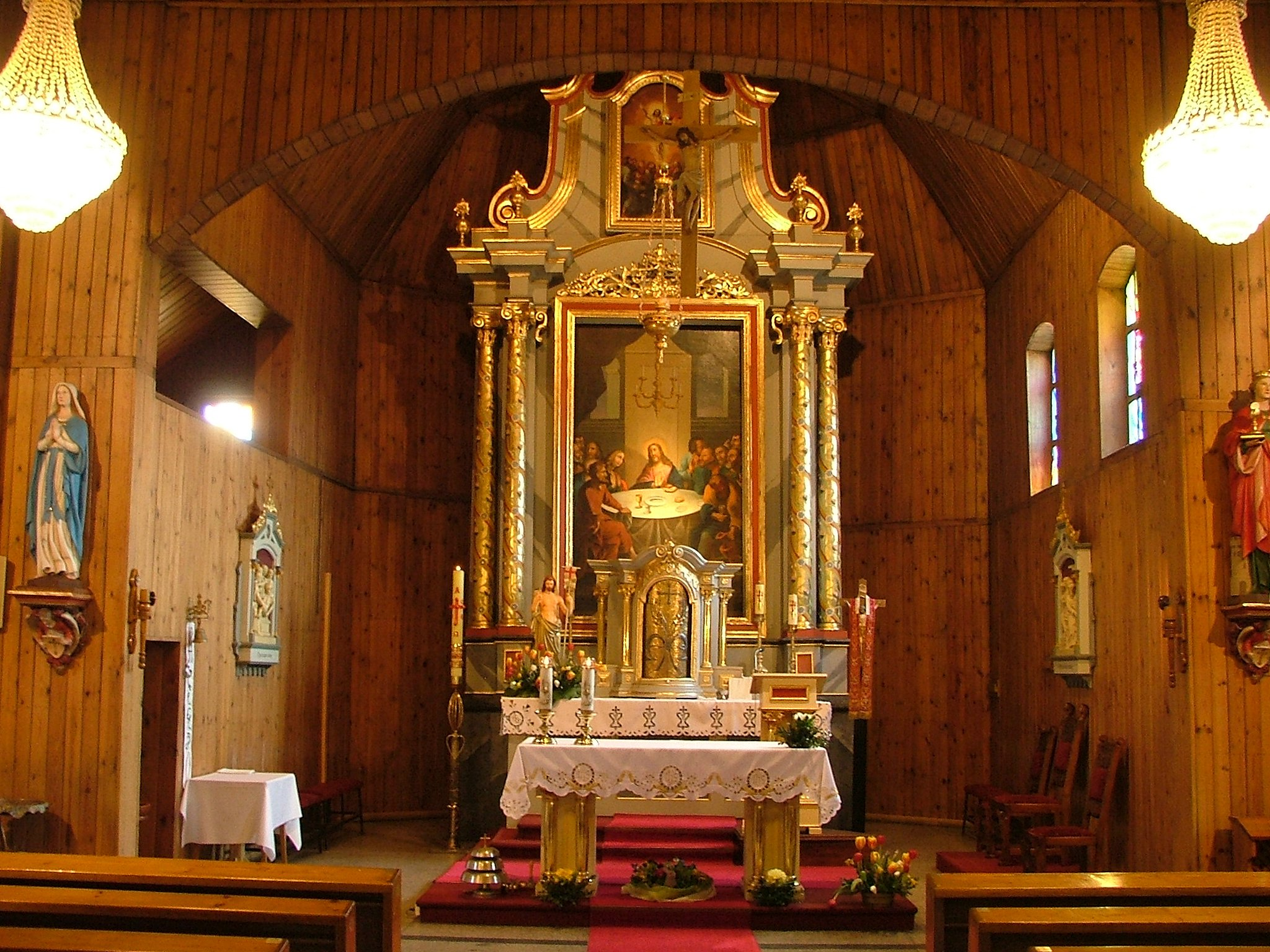 Kościol Bozego Ciala w Jankowicach Rybnickich, praca wlasna, 2006